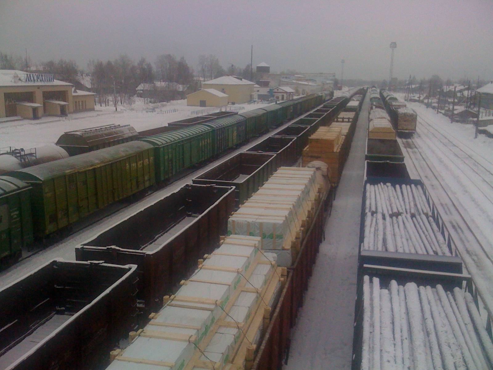 Вид на железнодорожную станцию Мураши Горьковской железной дороги.